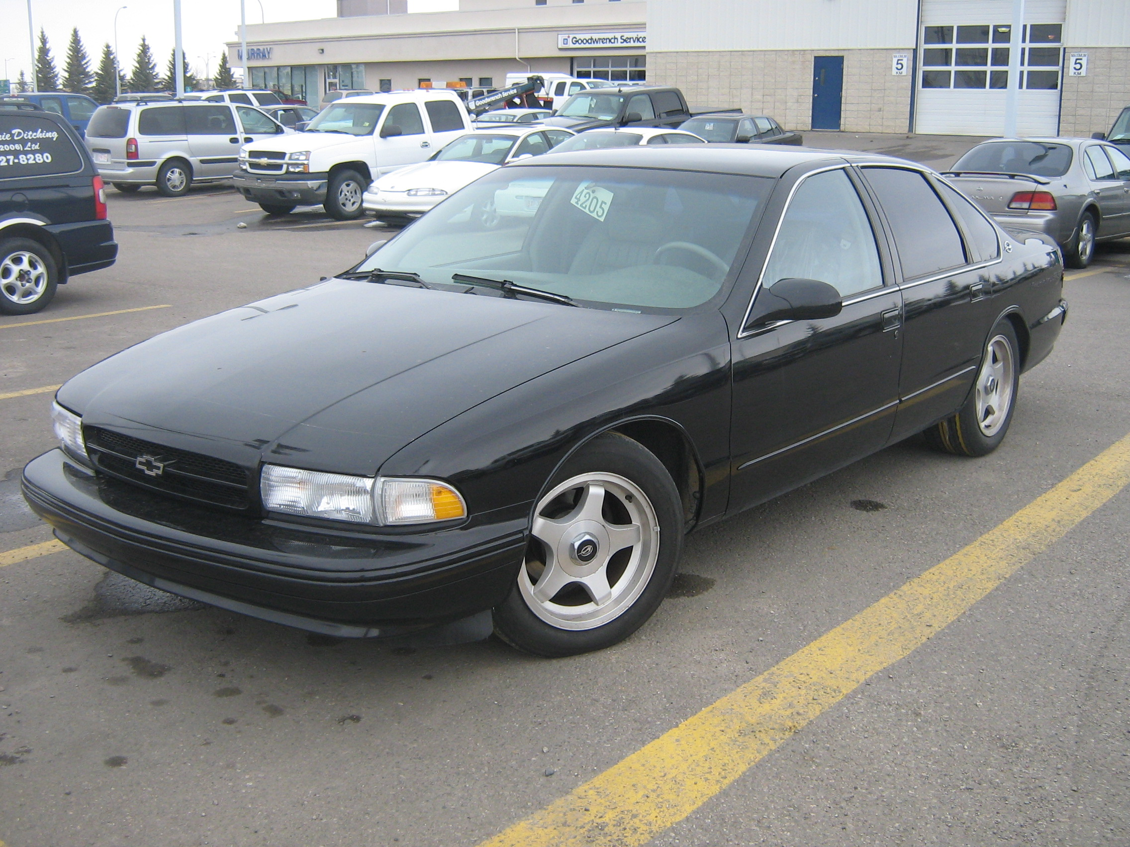 Chevrolet Impala SS